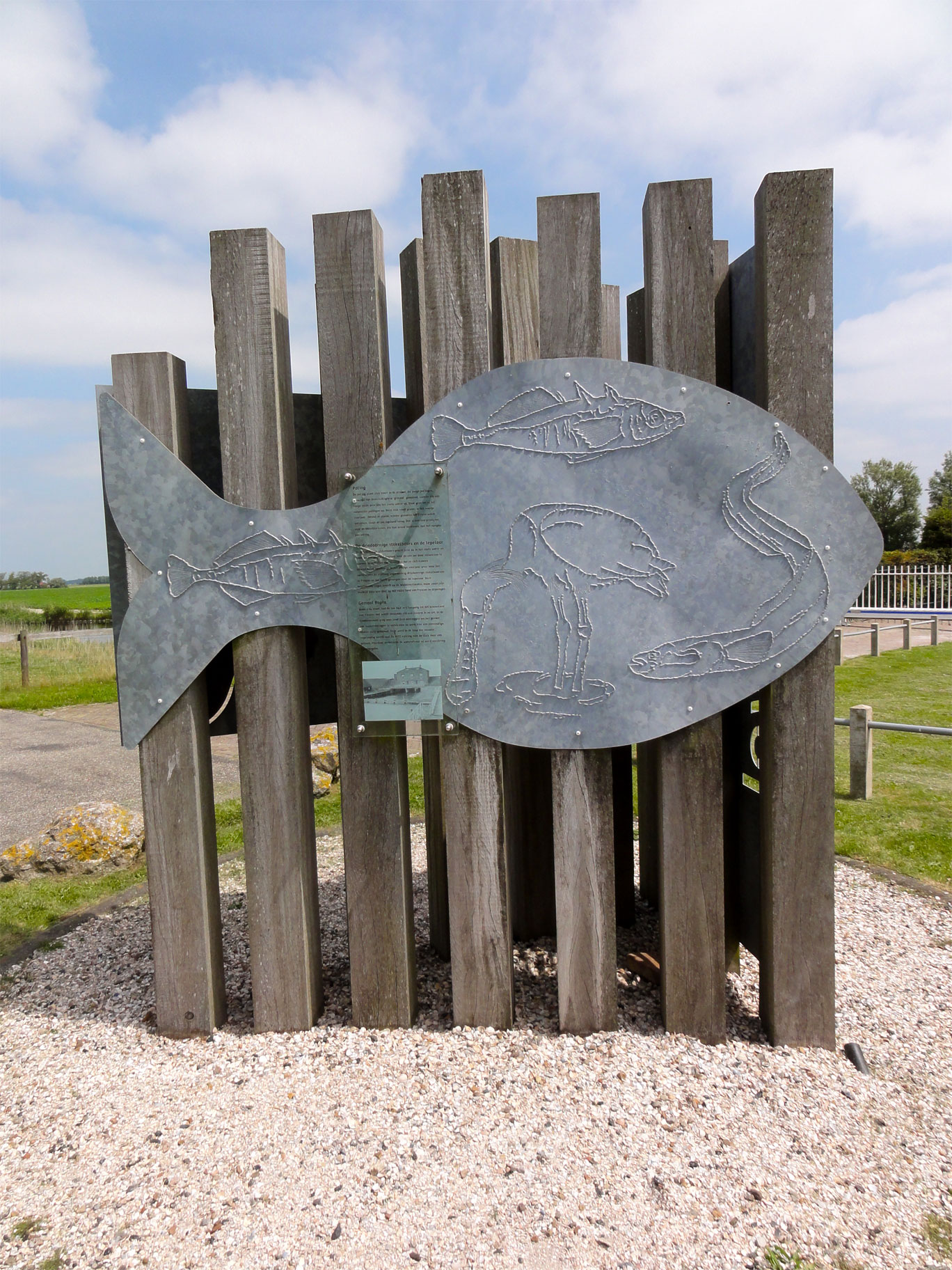 "Vis" nabij Roptazijl